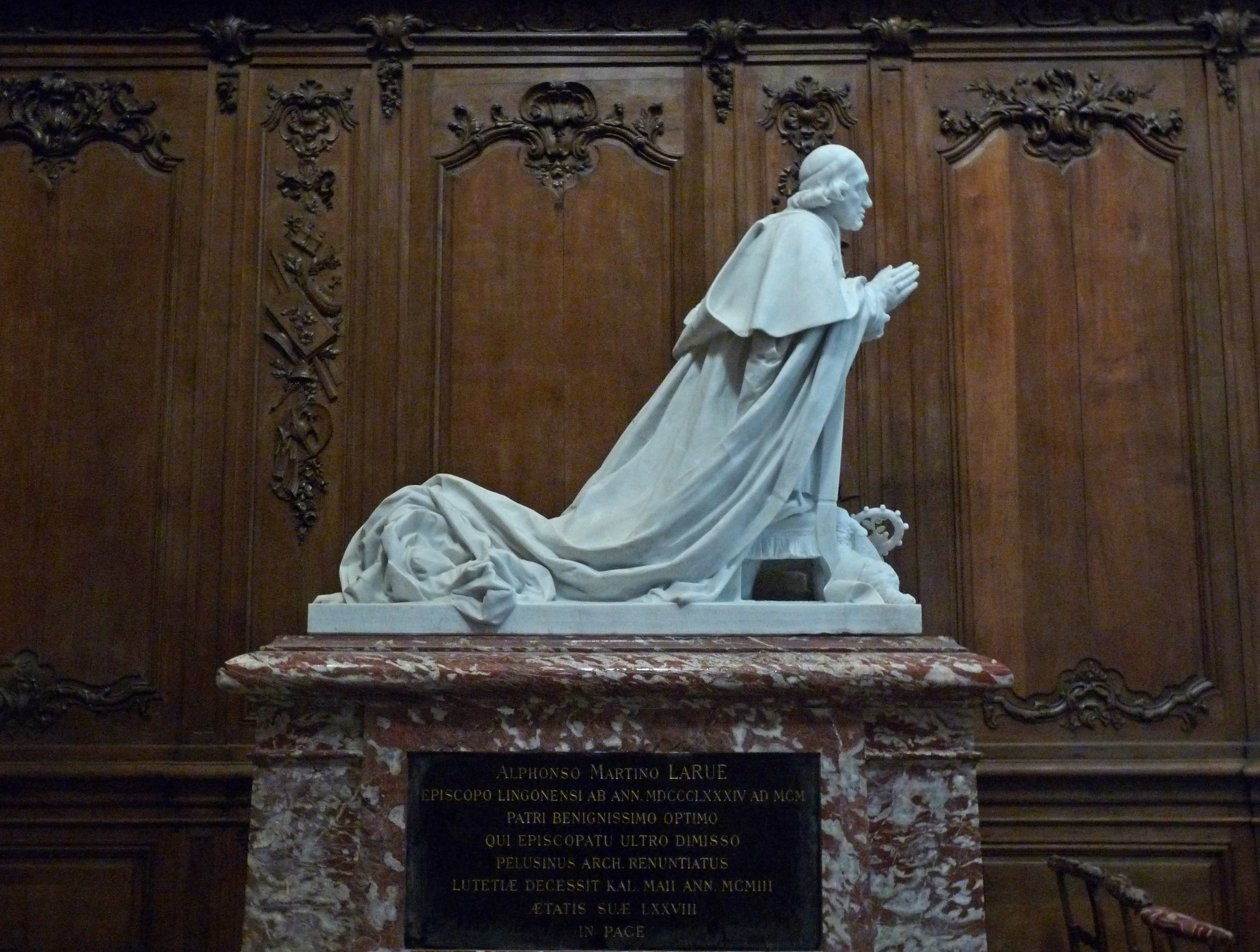 Denys Puech (1854–1942), Monument funéraire de Mgr Alphonse Martin Larue (évêque de Langres de 1884 à 1899). Langres, cathédrale Saint-Mammès.